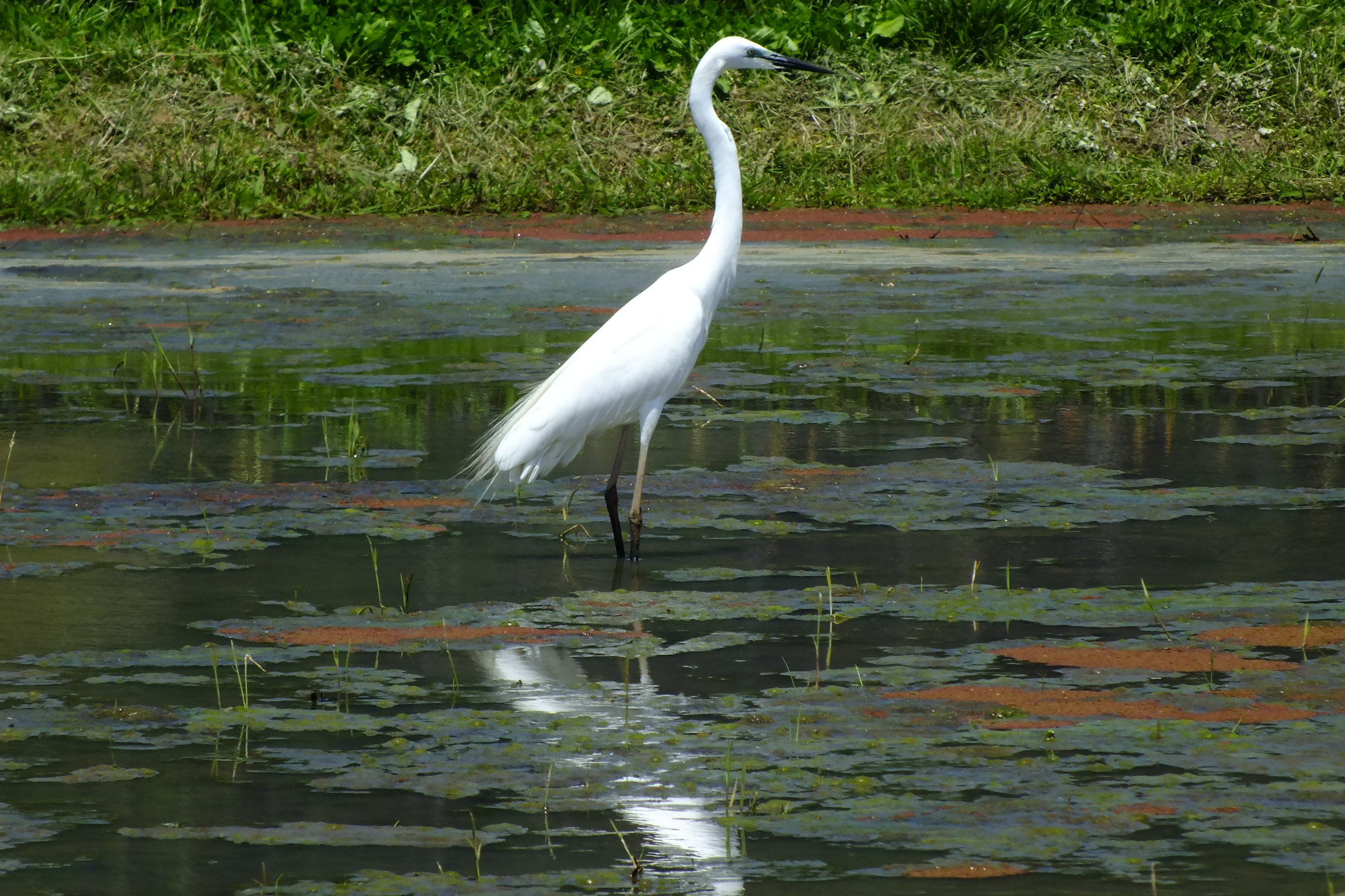 Ardea alba in water,Sasayama,Hyogo Japan 篠山市藤岡の白鷺